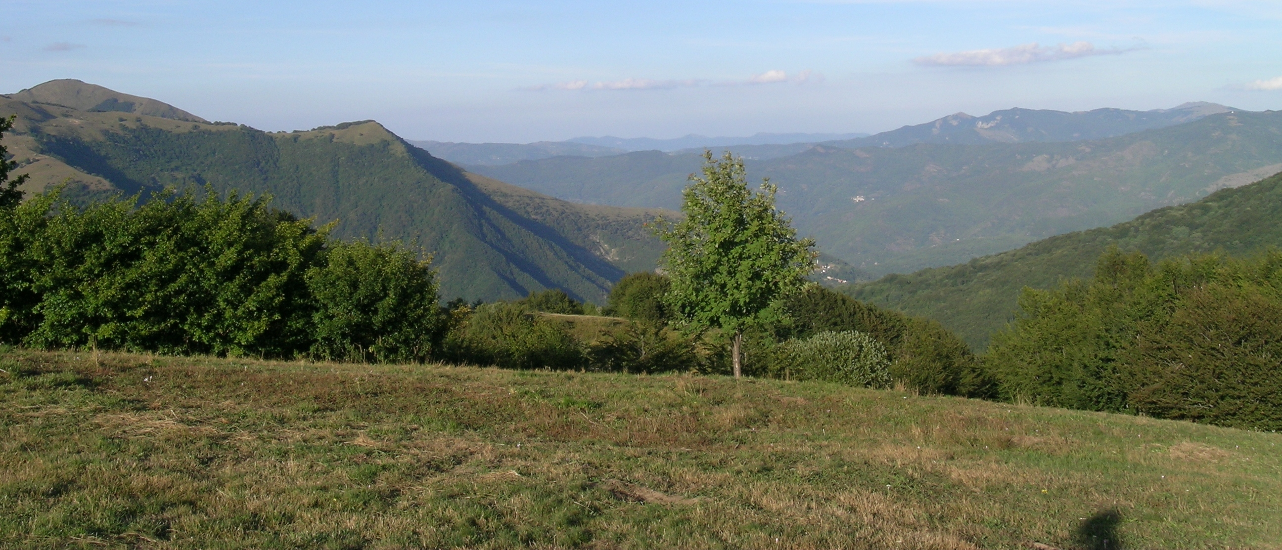 La Val Trebbia da Casa del Romano.